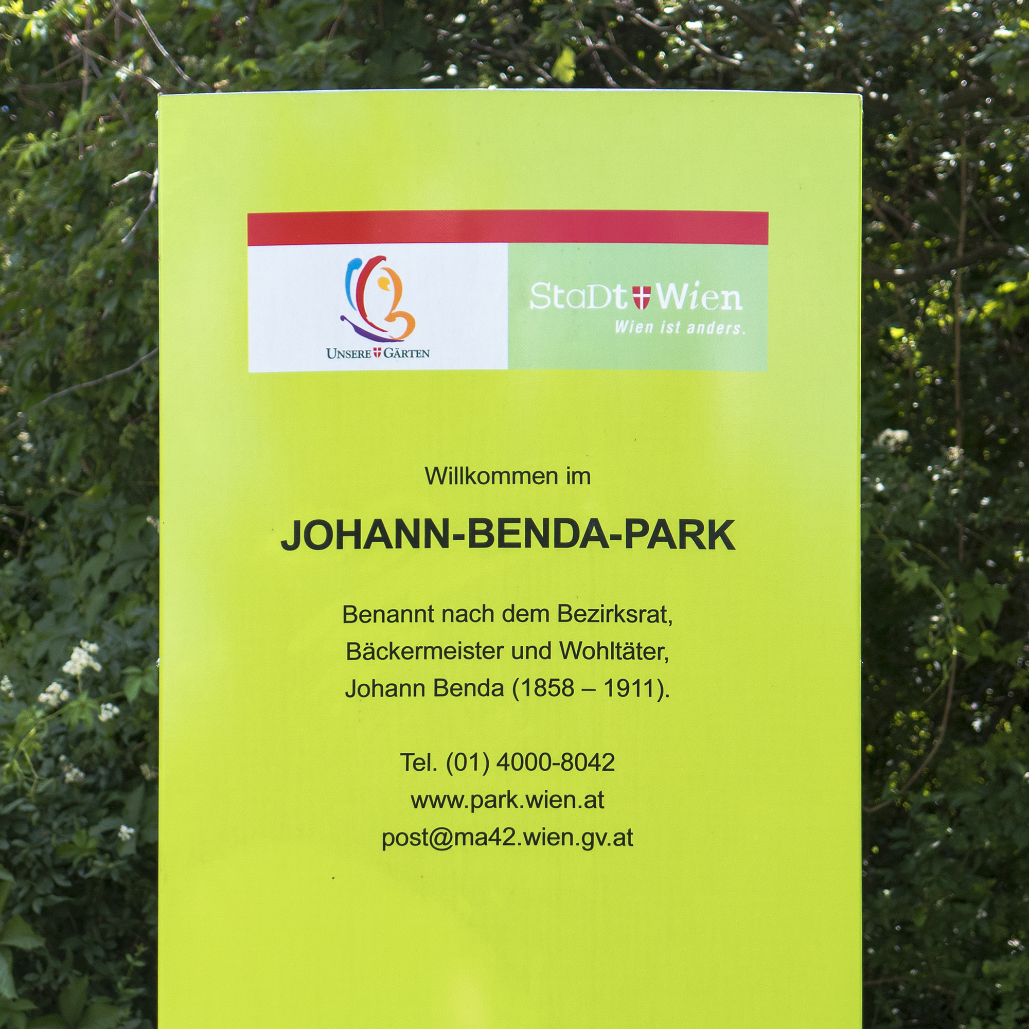 Johann-Benda-Park in Wien 10